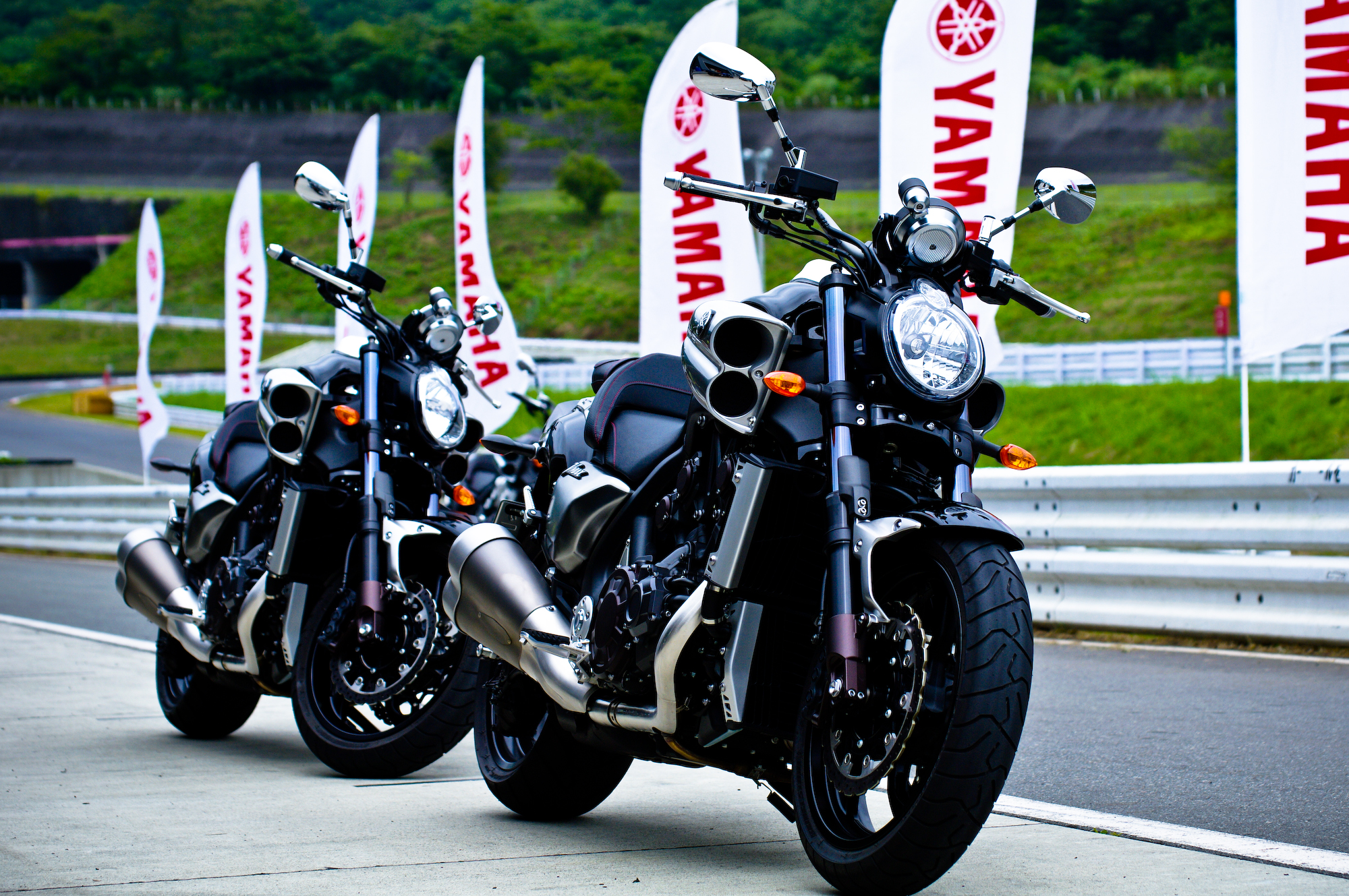 VMAX day 2009